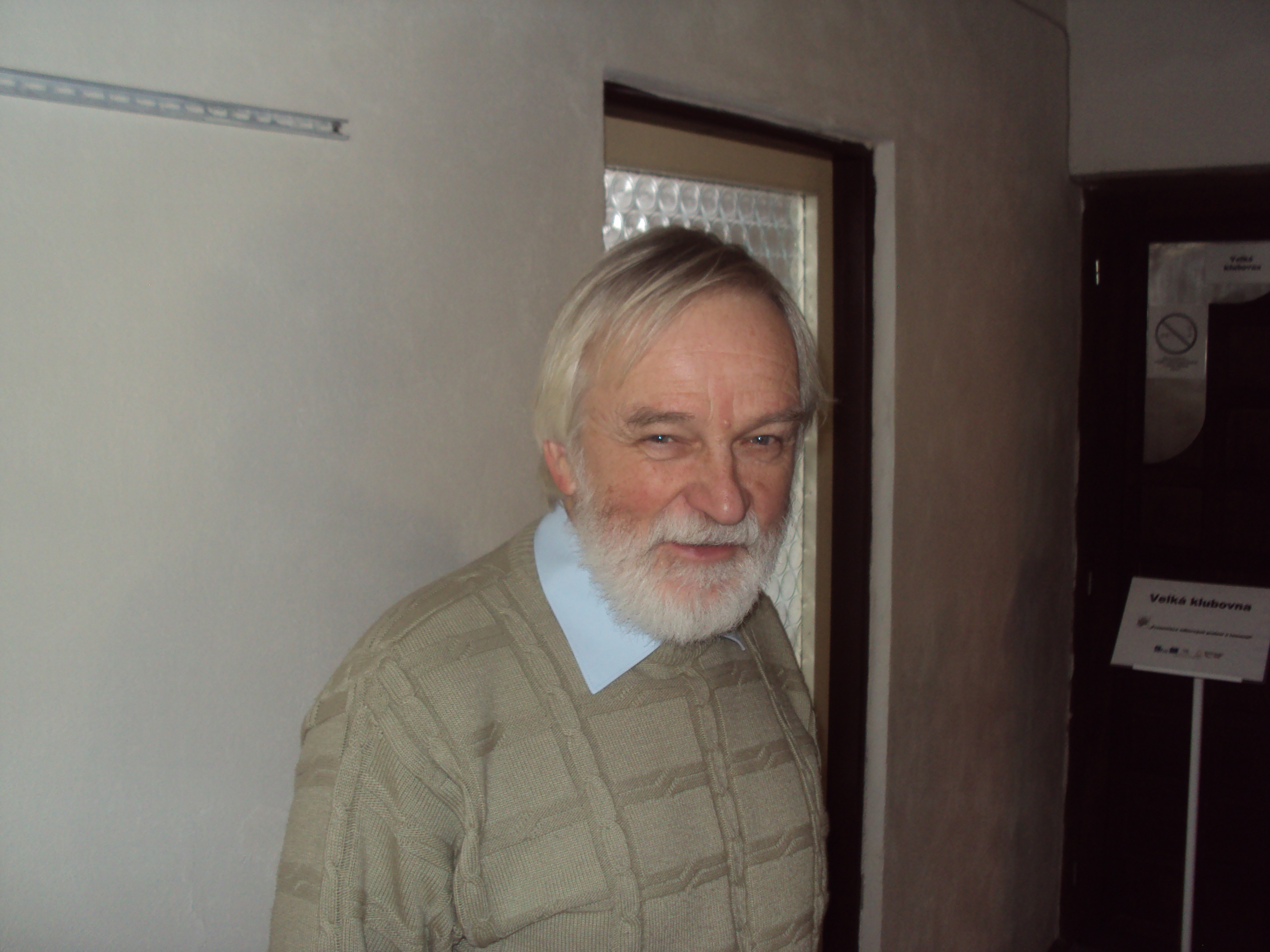 Česky: Autor knih, dlouholetý pracovník archivu v České Lípě